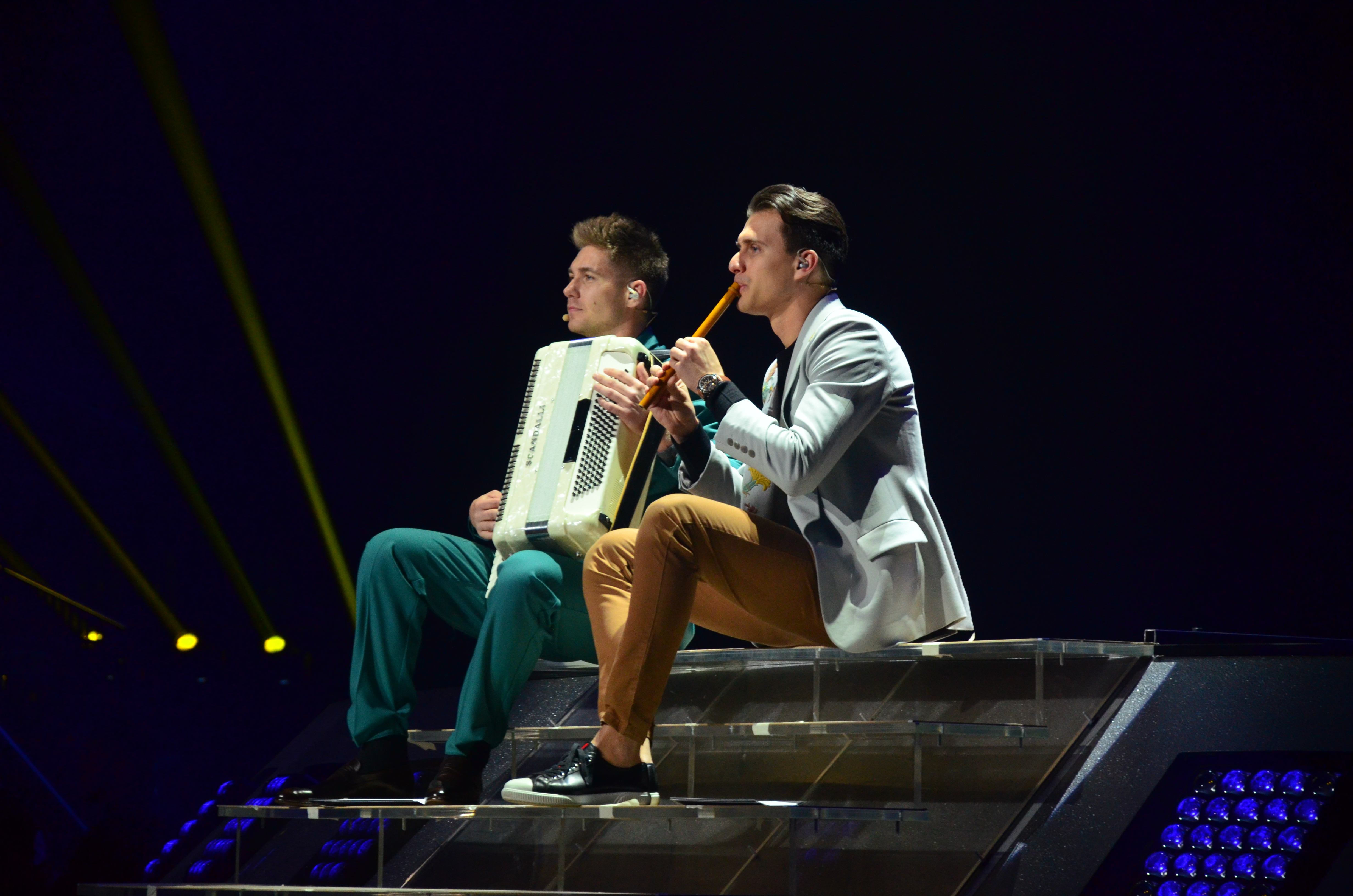 10 травня 2017 року у Києві відбулась генеральна репетиція 2 півфіналу "Євробачення".